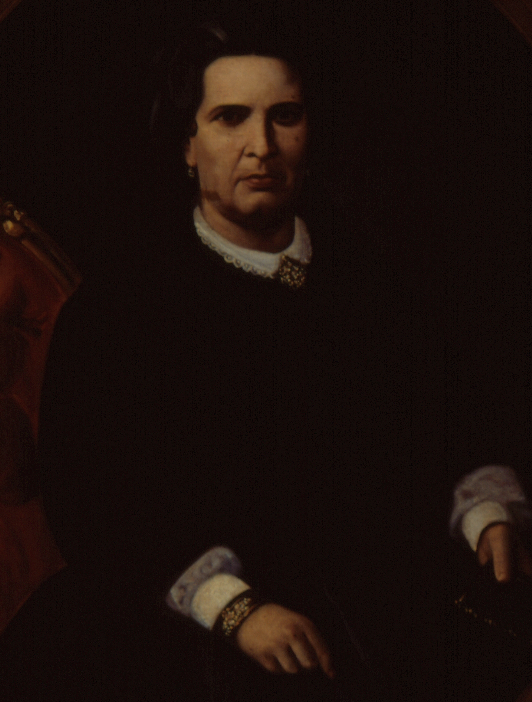 Obra que integra o acervo do Museu Paulista da USP.